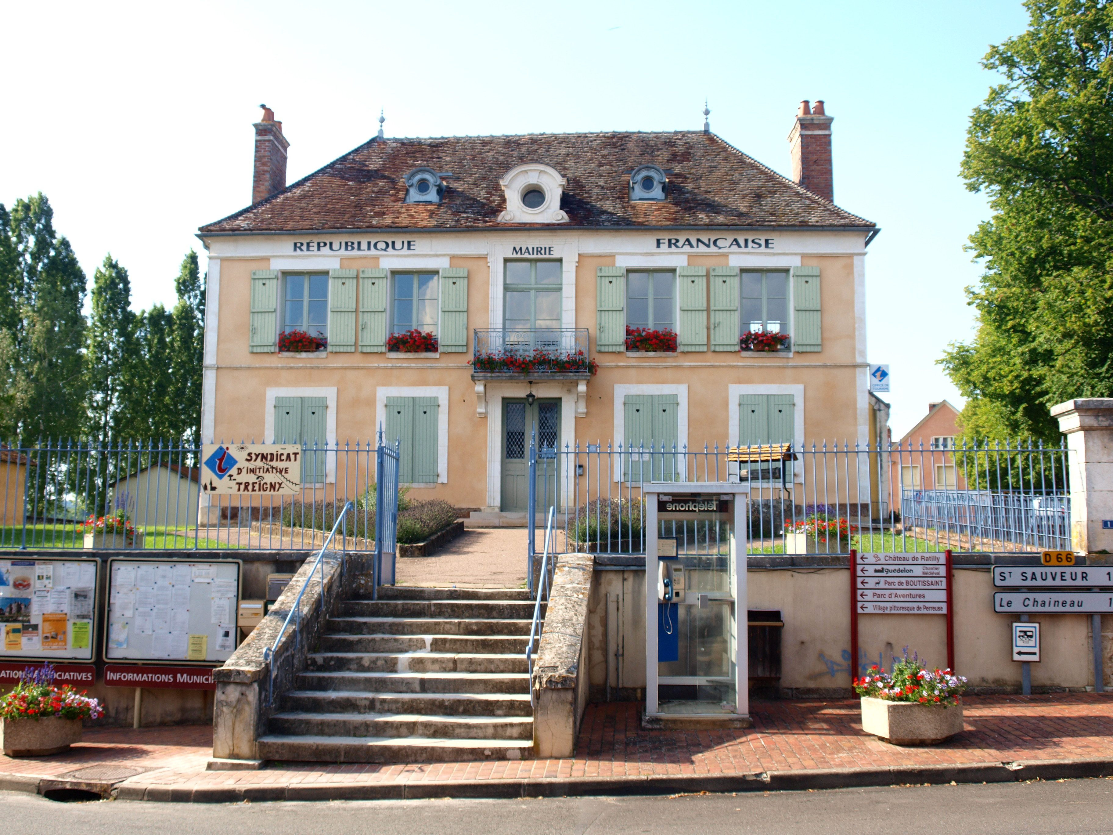 Treigny (Yonne, France) ; mairie